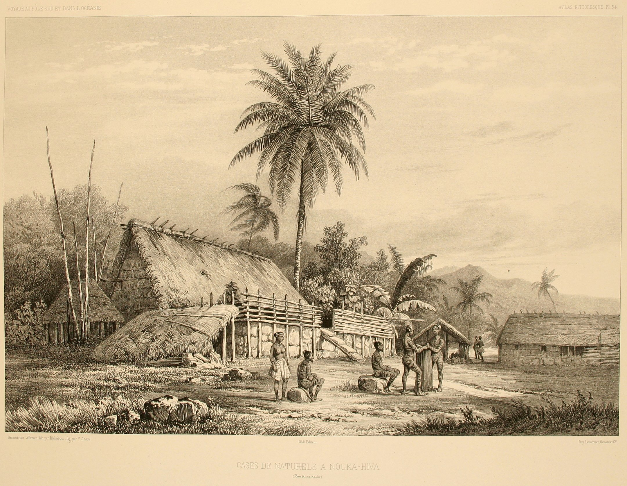 Cases de naturels à Nouka-Hiva. Atlas pittoresque, planche 54